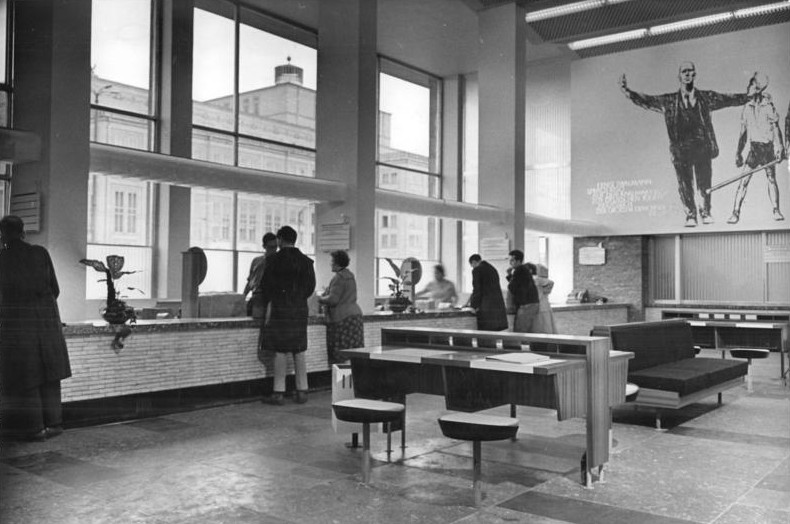 Leipzig, Hauptpost, Schalterhalle Zentralbild Koch-Kluge 2.9.1964 Das modernste Postgebäude der DDR ist das mit einem Kostenaufwand von 14 Millionen MDN gebaute Postamt C I in Leipzig. Das 110 Meter lange Gebäude wurde als erster Bauabschnitt einen großen Postkomplexes errichtet. Unser Foto zeigt einen Blick in die Schalterhalle für den Paketverkehr.